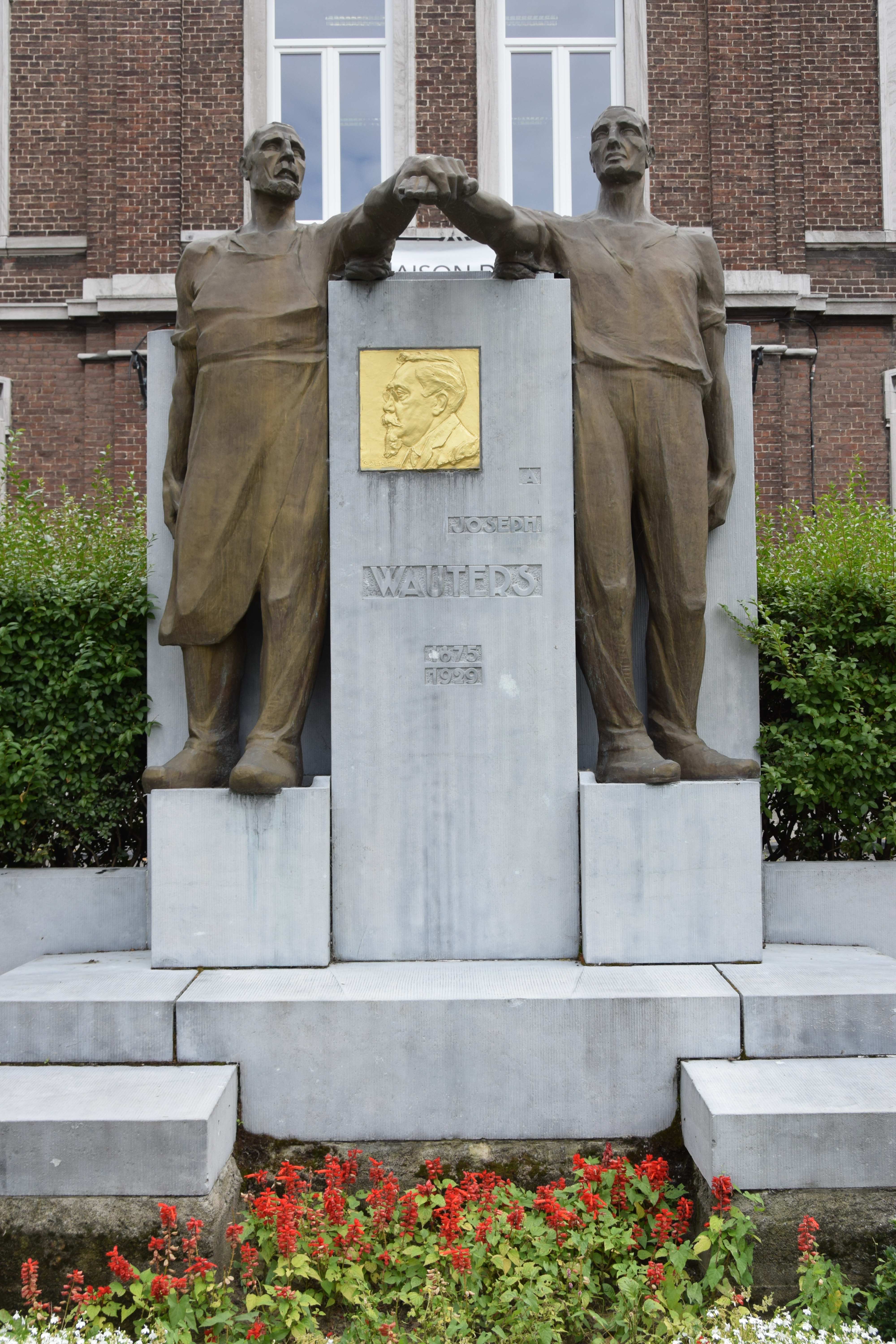 Vue de Waremme, en Hesbaye (province de Liège, en Belgique).